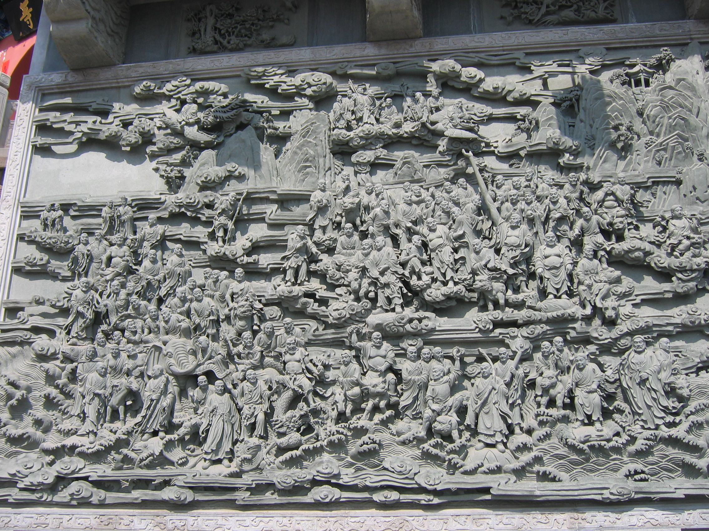 八大处公园内雕刻（2）